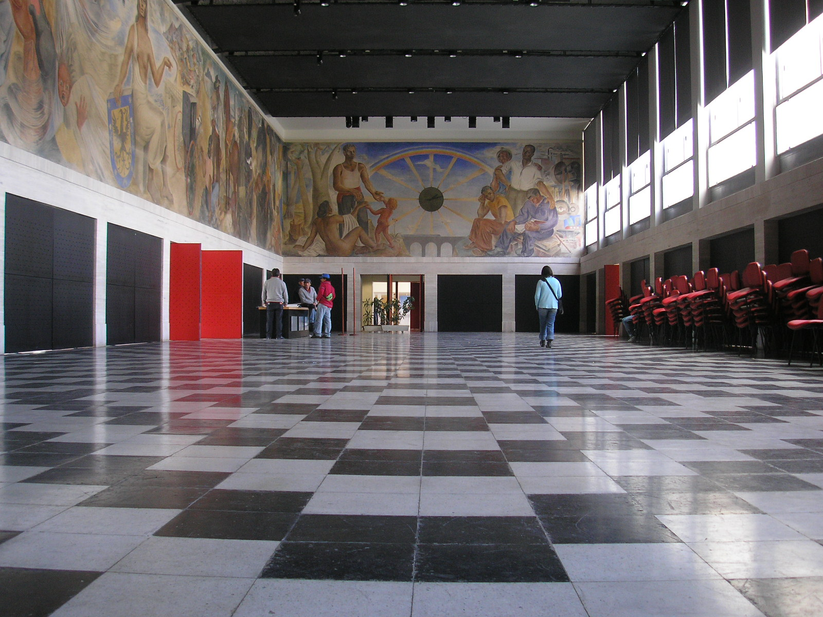 Mural "Historia de Concepción". Nótese el efecto visual del pavimento de la sala. This is a photo of a national monument in Chile: 2150